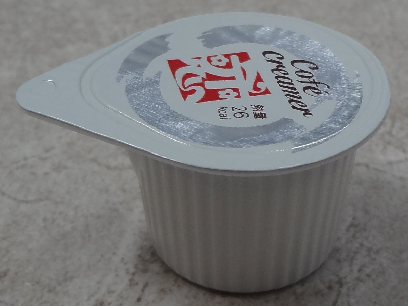 2016年11月28日，開元食品製造的戀奶精球10公克裝。